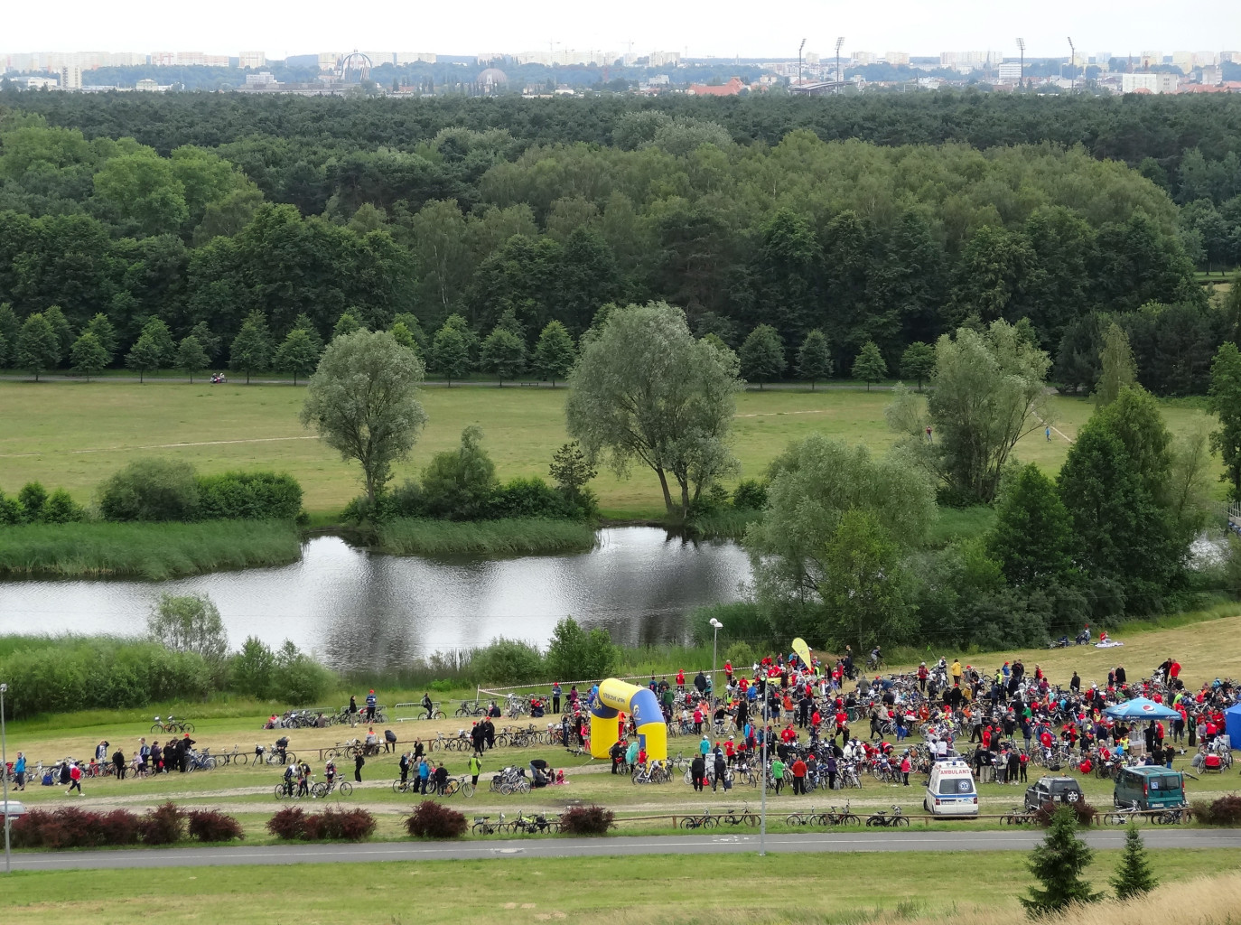 Widok z Góry Myślęcińskiej w Bydgoszczy. W tle meta rajdu rowerowego Galerii Pomorskiej